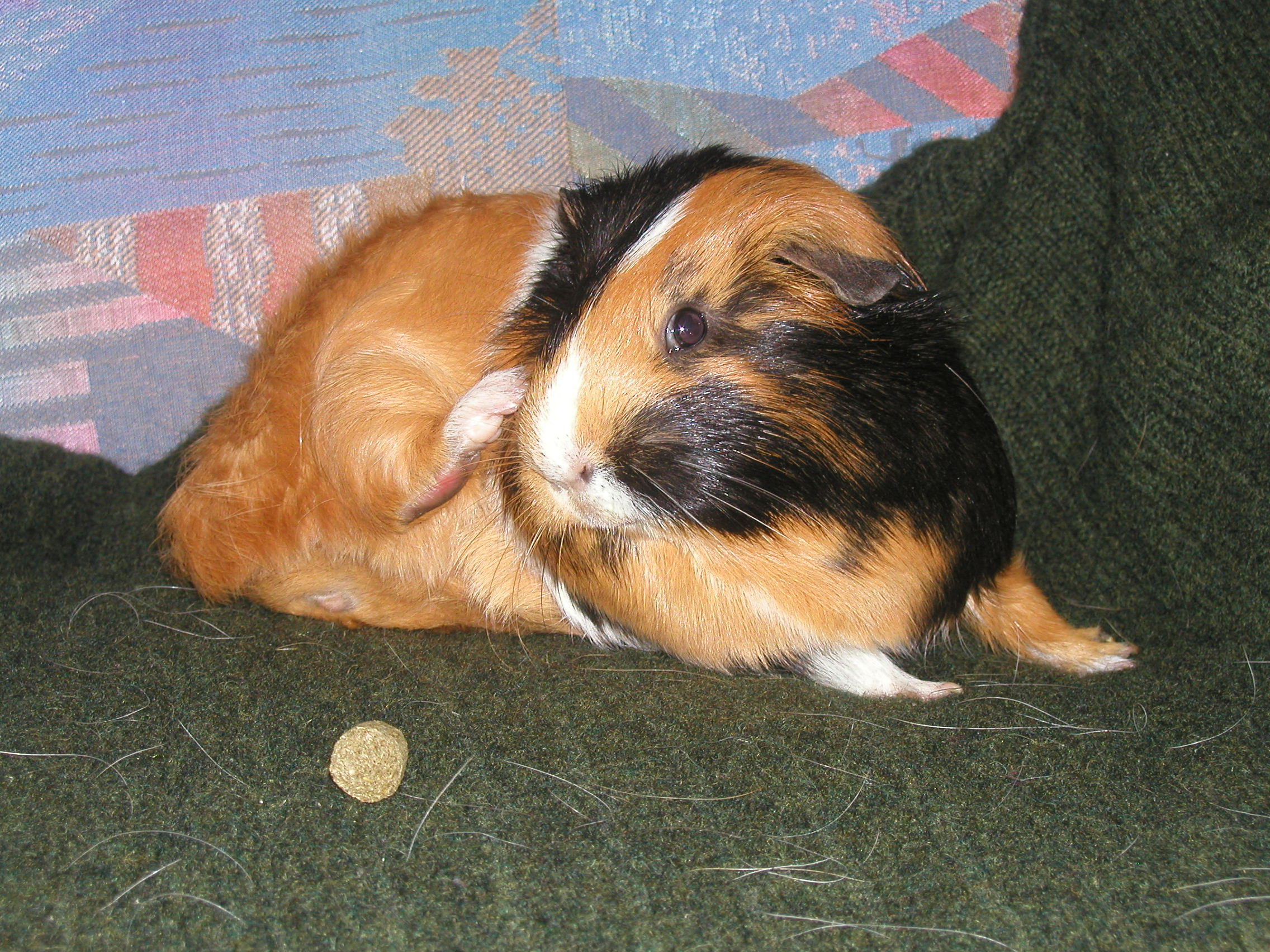 Hausmeerschweinchen (Cavia porcellus) - Ein weibliches Glatthaar- Meerschweinchen putzt sich. Quelle: eigene Aufnahme am Dezember 2004 Fotograf: Roman Klementschitz (= Einer flog zu Weit), Wien